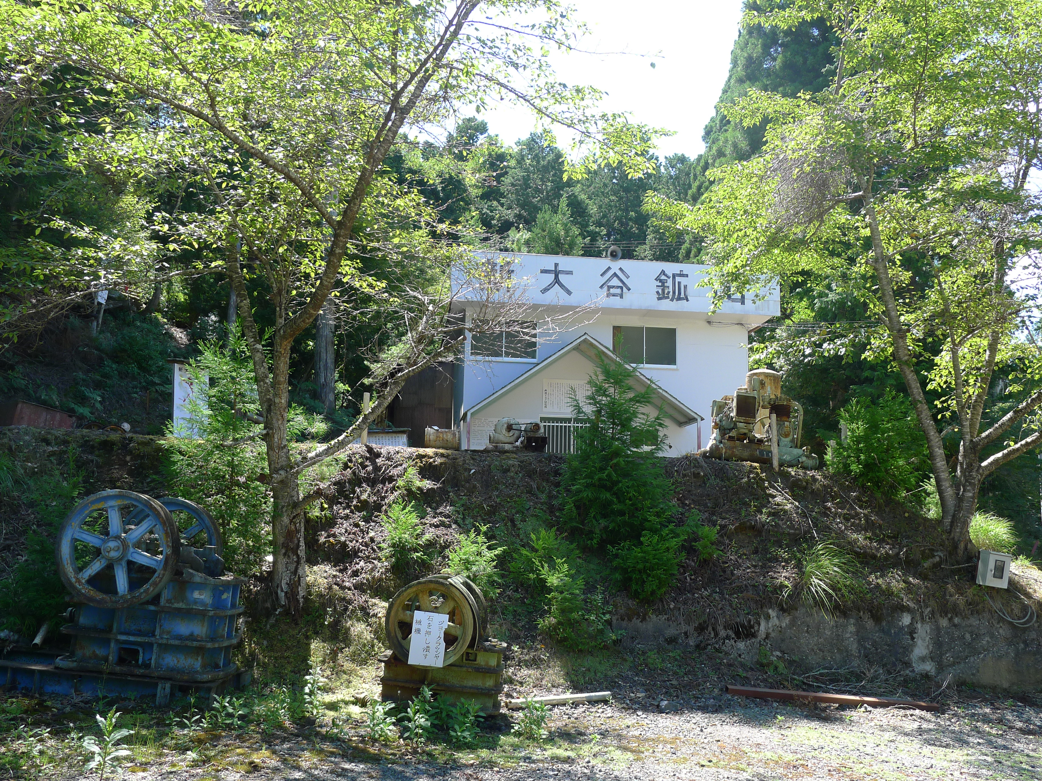 丹波高原で昭和58年まで掘削されていた丹波マンガン鉱山